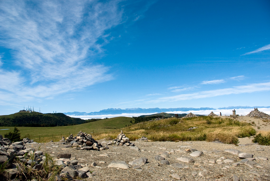 美ヶ原高原 牛伏山展望台